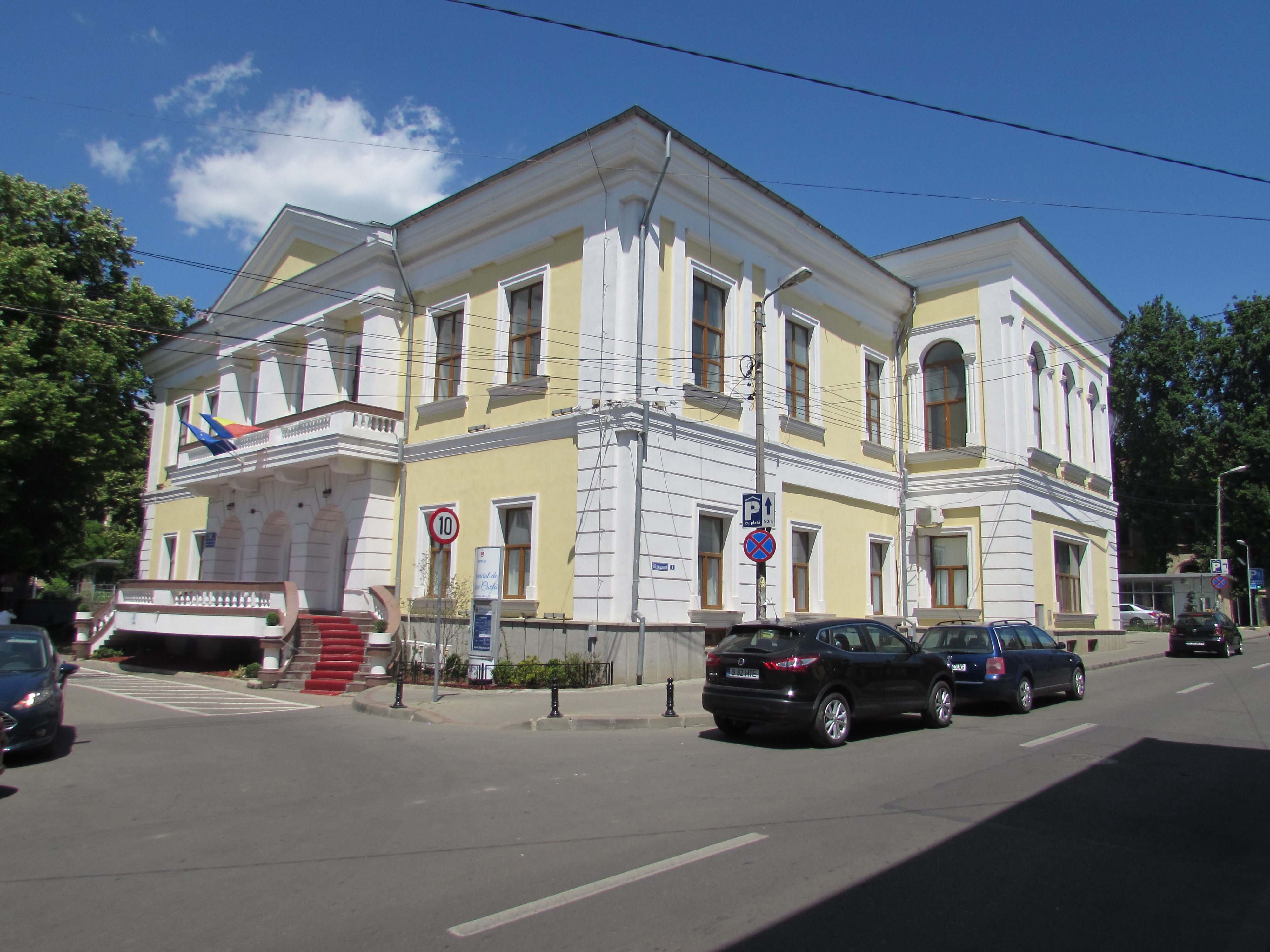 Palatul Cantacuzino-Pașcanu din Iași, clădire monument istoric construită la sfârșitul secolului al XVIII-lea.